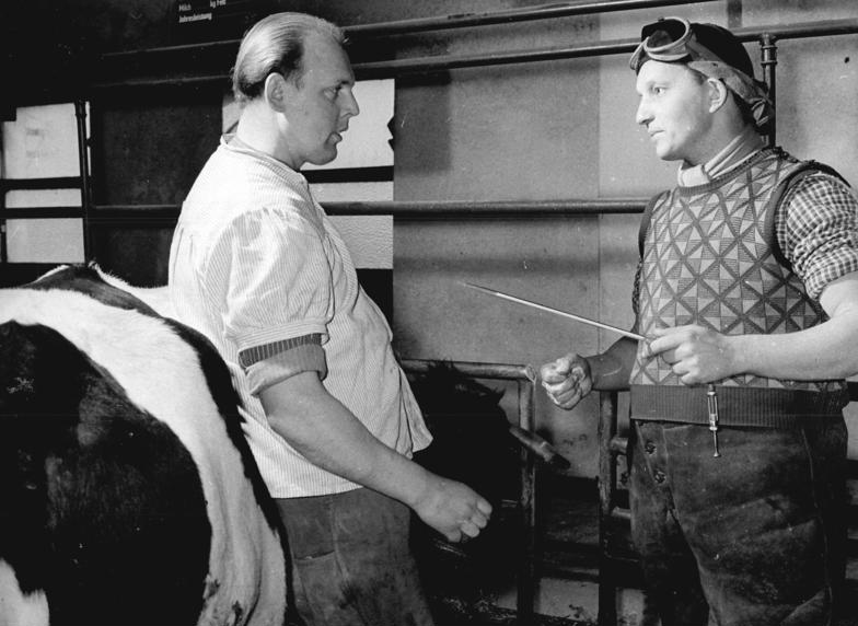 Jesewitz, Besamungstechniker mit Bauer im Gespräch Zentralbild Schaar 27.1.1960 Jesewitzer überbieten den Plan 1960. Den Produktionsplan für 1960 zu überbieten und bis 1961 Westdeutschland in allen Positionen der Viehwirtschaft zu übertreffen, beschlossen die Bauern der Geminde Wasewitz im vollgenossenschaftlichen Kreis Eilenberg, bei denen vor wenigen Tagen der Erste Sekretär des ZK der SED, Walter Ulbricht, weilte. Zur Sicherung einer guten Futtergrundlage werden in Jesewitz in diesem Jahr 15 Prozent der Ackerfläche mit Mais und 34 Prozent mit Zwischenfrüchten bestellt. Hier einige Beispiele aus dem Kampfziel der Gemeinde Jesewitz. Plan 1960 Rinder je 100 ha 77, Kühe je 100 ha 38, Milch kg je Kuh 3200, Schweine je 100 ha 148. Ziel 1960 Rinder je 100 ha 85, Kühe je 100 ha 40, Milch kg je Kuh 3350, Schweine je 100 ha 155. Westdeutschland Rinder je 100 ha 85, Kühe je 100 ha 39 Milch kg je Kuh 3408, Schweine je 100 ha 103. Dänemark Rinder je 100 ha 104, Kühe je 100 ha 45, Milch kg je Kuh 3625, Schweine je 100 ha 175. UBz: Um die Verpflichtungen zu erreichen, das Abkalbergebnis 1960 auf 100% zu steigern, werden die Kühe doppelt besamt. Besamungstechniker Rudolf Viola (rechts) i, Gespräch mit dem Melker Heis Windisch.